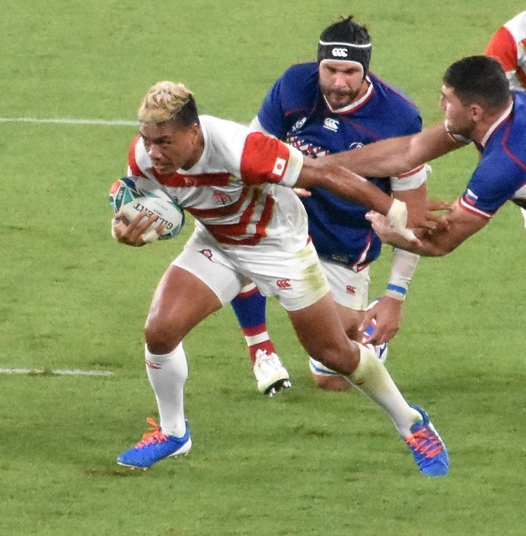 レメキロマノラヴァ